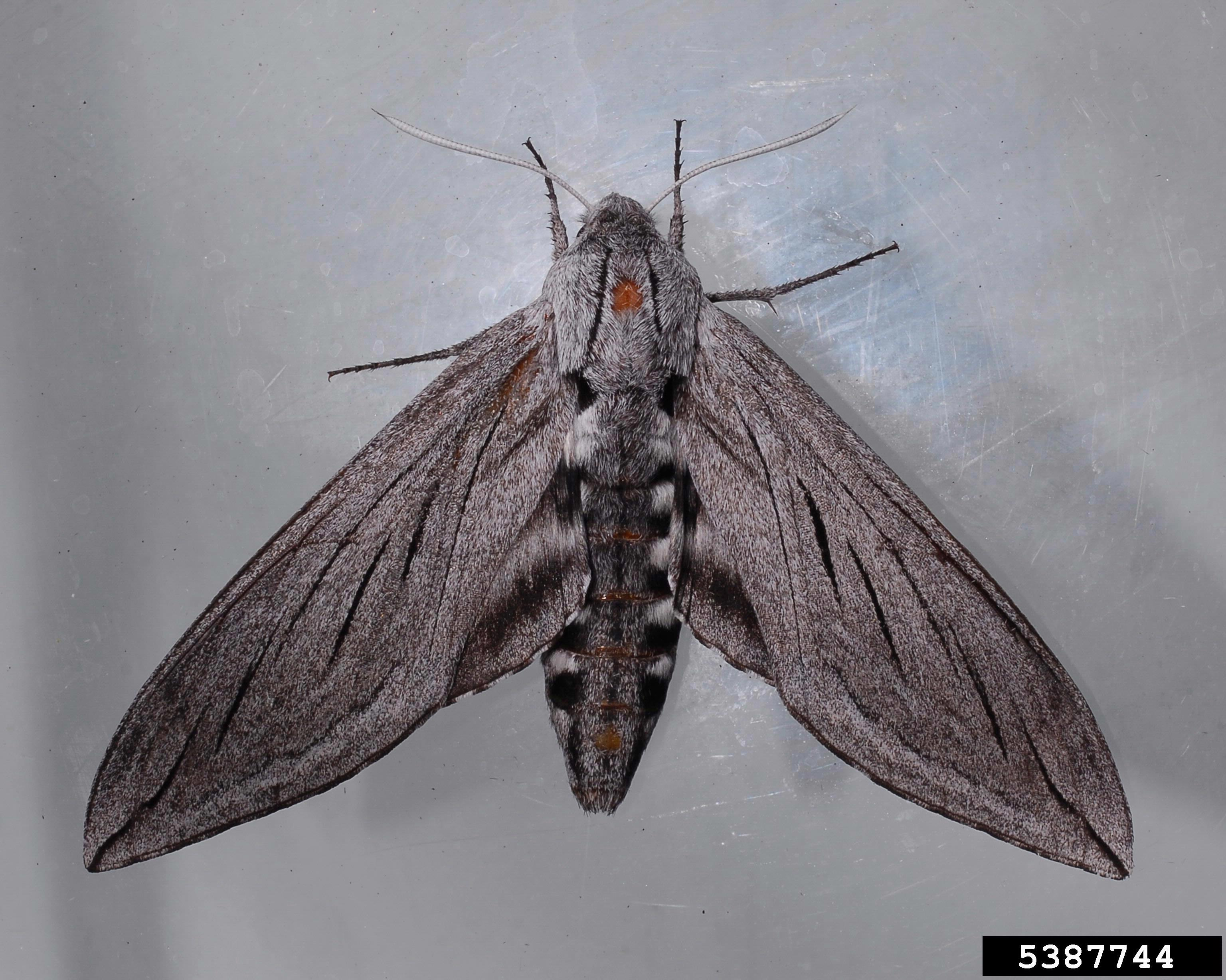 Sphinx chersis